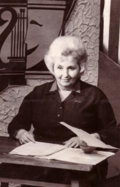 фотография М.И.Саенко